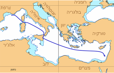 אוניית המעפילים נחשון - מסלול